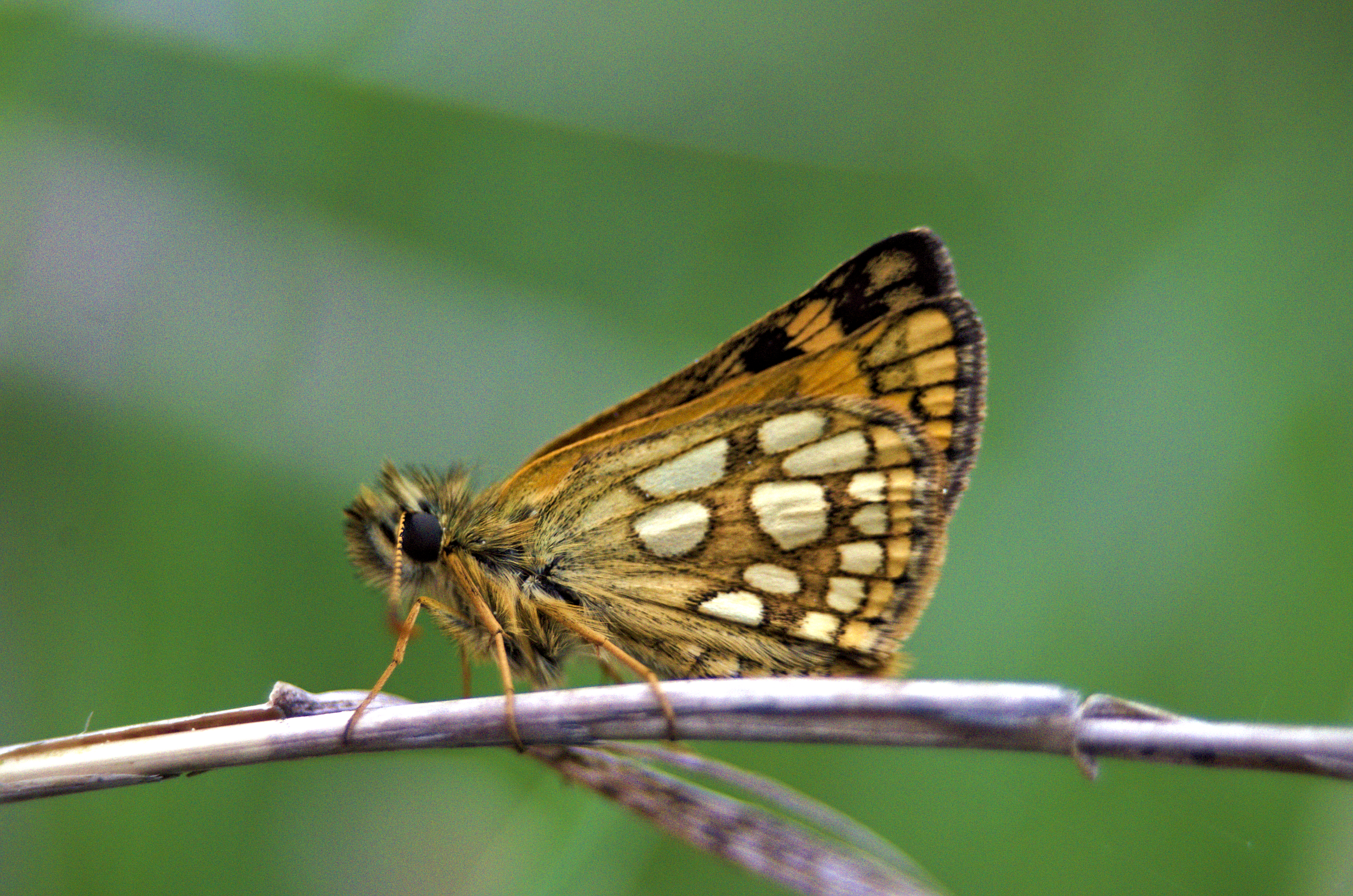 Gelbwürfeliger Dickkopffalter (Carterocephalus palaemon)